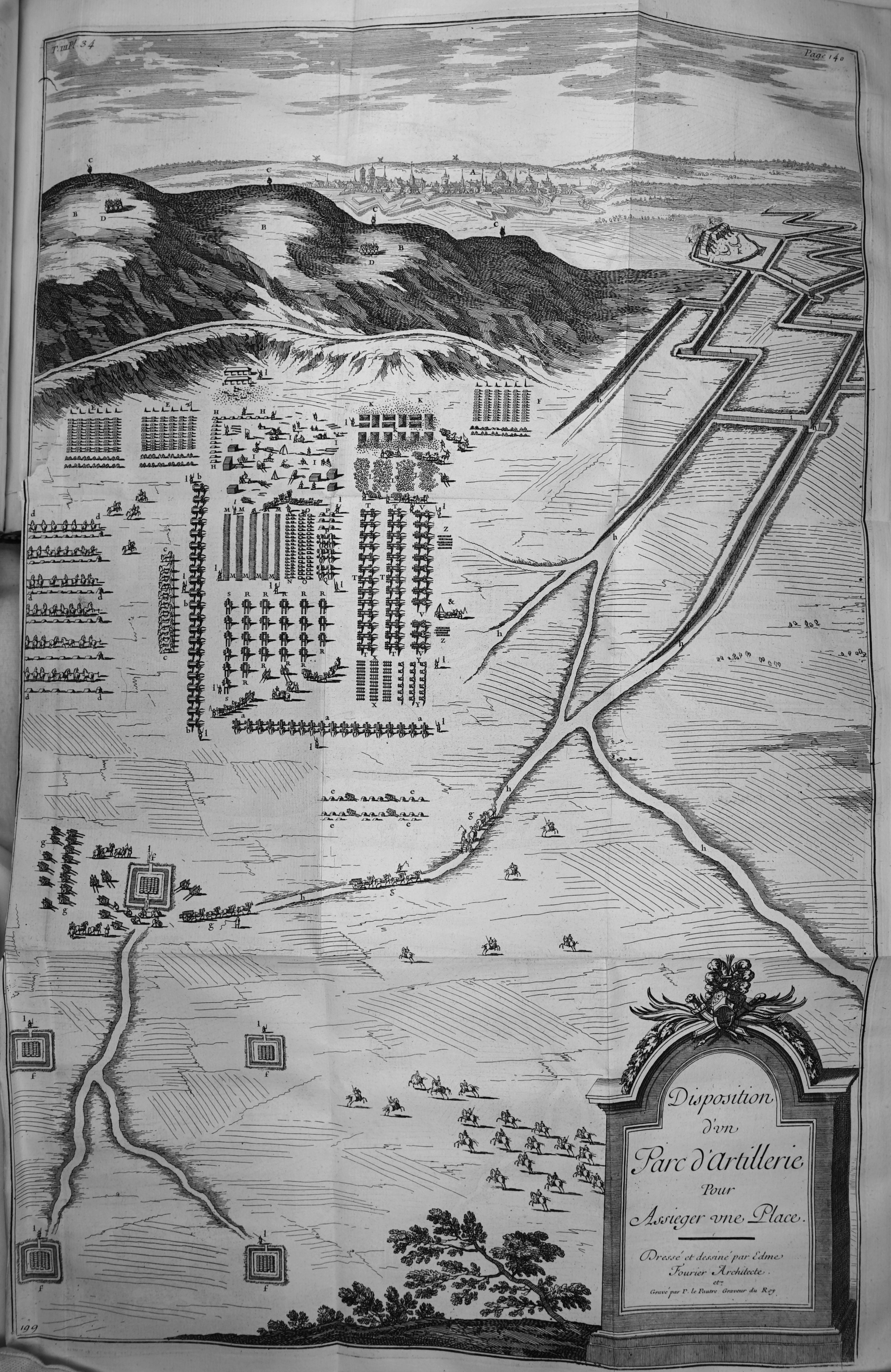 Mémoires d'artillerie, recueillis par M. Surirey de Saint Remy, exemplaire de la B.M. de Reims, troisième édition.